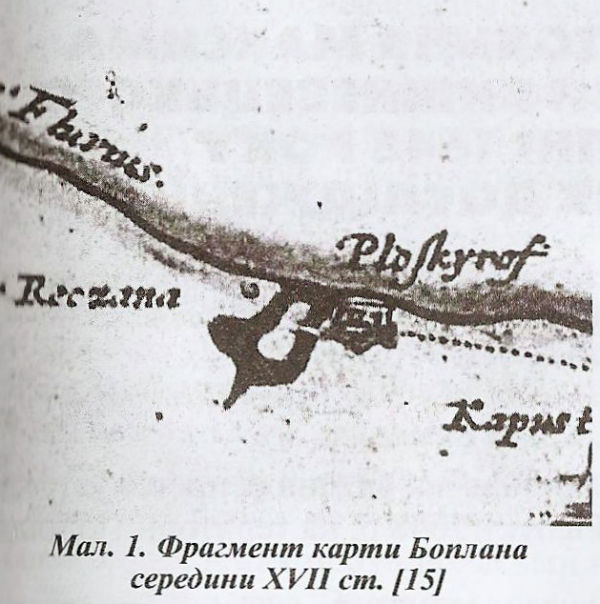 Карта Боплана міста Плоскирова з замком